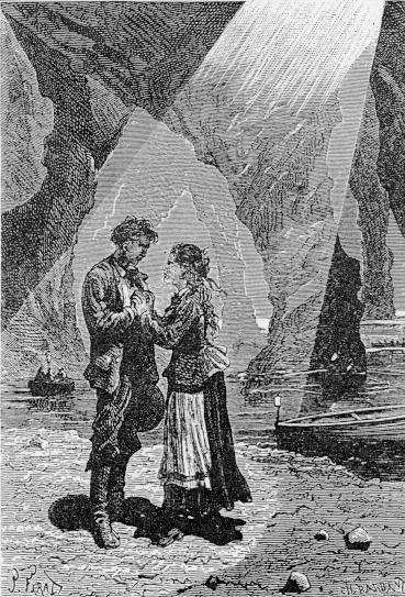 Původní ilustrace Julese Férata k románu J. Verna